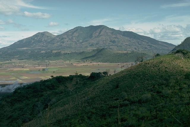 Suchitán volcano in Guatemala.